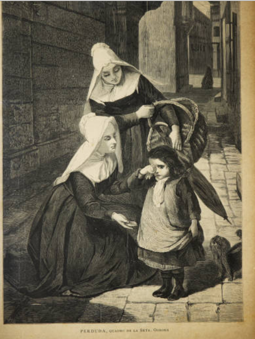 Quadro de la Sta Osborn La Ilustració Catalana, número 105 29 febrer de 1884 pàg. 53